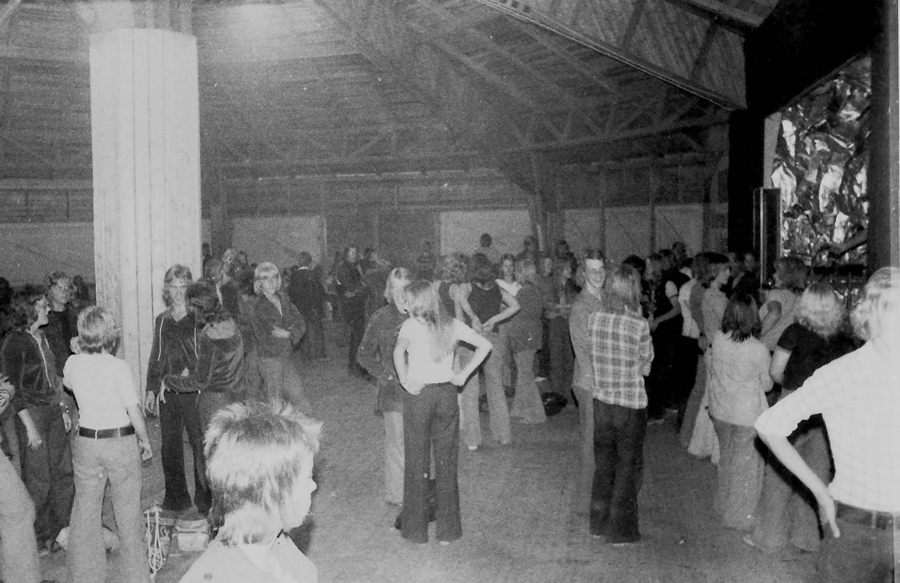 Kuva Sääkshovin tansseista 16.7.1973. Kuvassa näkyy oikealla silloin alumiinifoliolla verhottu esiintymislava. Kuvassa erottuu myös mutterilavoille tyypillinen seinä- ja kattorakenne. Kuvaaja: Juhani Lehtiranta